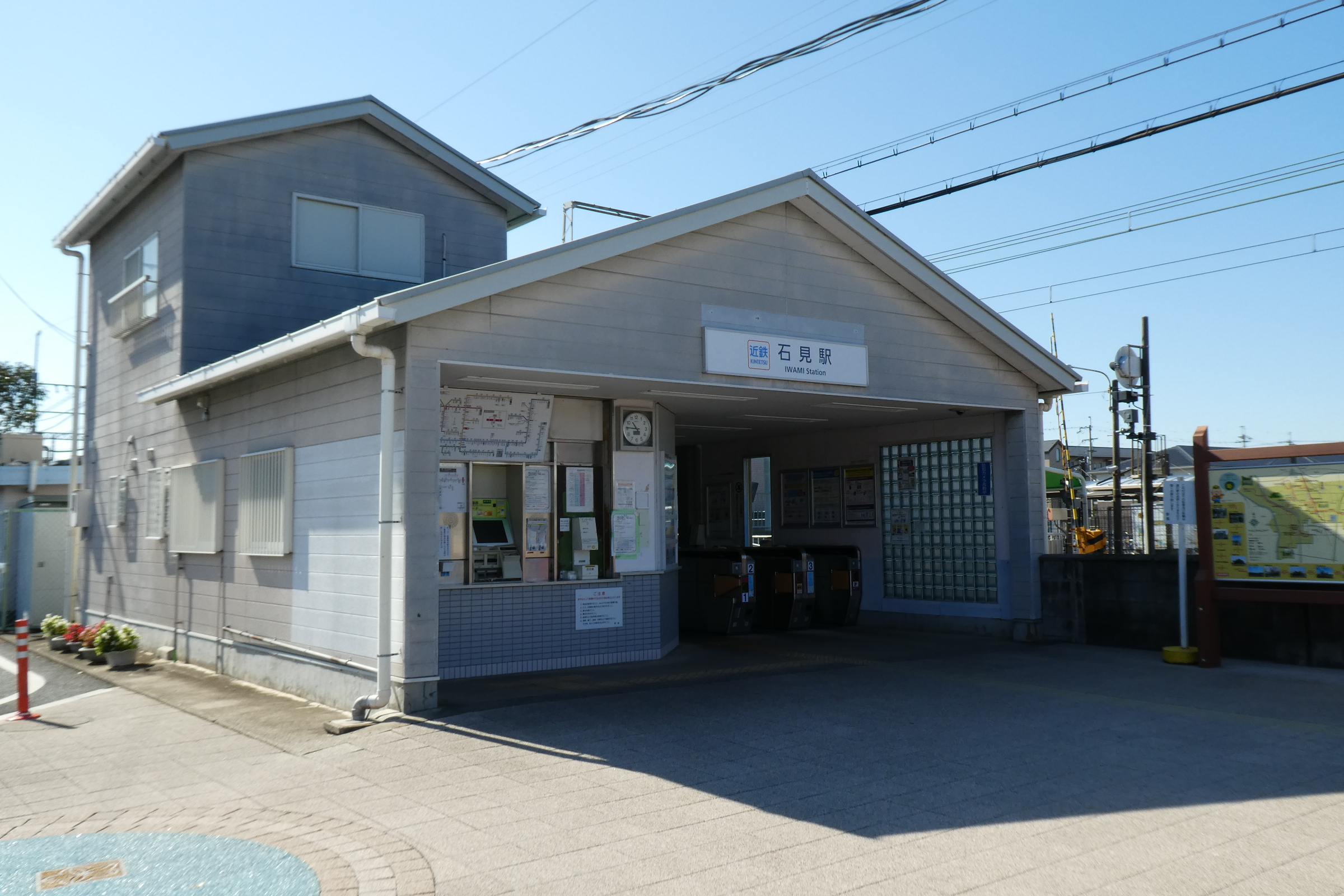 近鉄橿原線 石見駅。